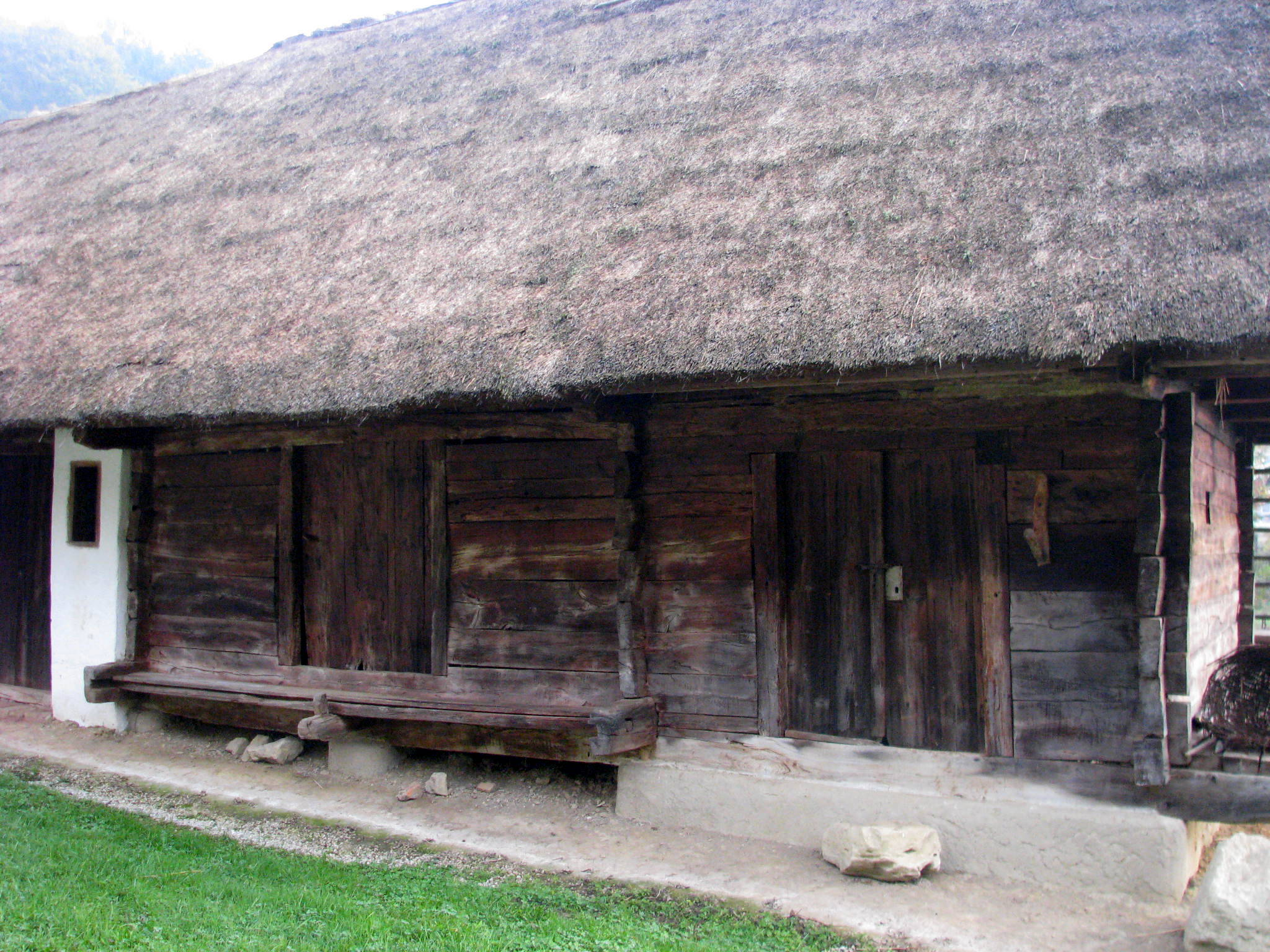 Junež farm, Rogaška Slatina, Slovenia